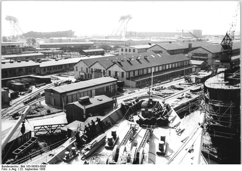 Warnemünde, Warnow-Werft Zentralbild "Mi" 22.9.1958 10000 to Fachter an der Wardow-Werft In der Wardow-Werft soll ab 1961 jeden Monat ein 10000 Tonnenfrachter fertiggestellt werden. Zur Zeit befinden sich neben grösseren Exportaufträgen für die sozialistischen Länder mehrere Frachter der "Städteserie" (10000 to) im Bau, die in der DDR in Dienst gestellt werden sollen. UBz: Ein Blick auf die Warnow-Werft. Vordergrund: Deckaufbauten der "Magdeburg". Hintergrund: Die 65 m hohe Kabelkrananlage, die modernste Europas.